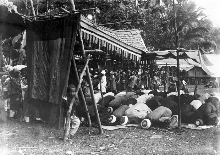 Repronegatief. Gebed op Idul Fitri, de eerste dag van de islamitische maand syawal (shawwal), het begin van het suikerfeest na de vastenmaand ramadan